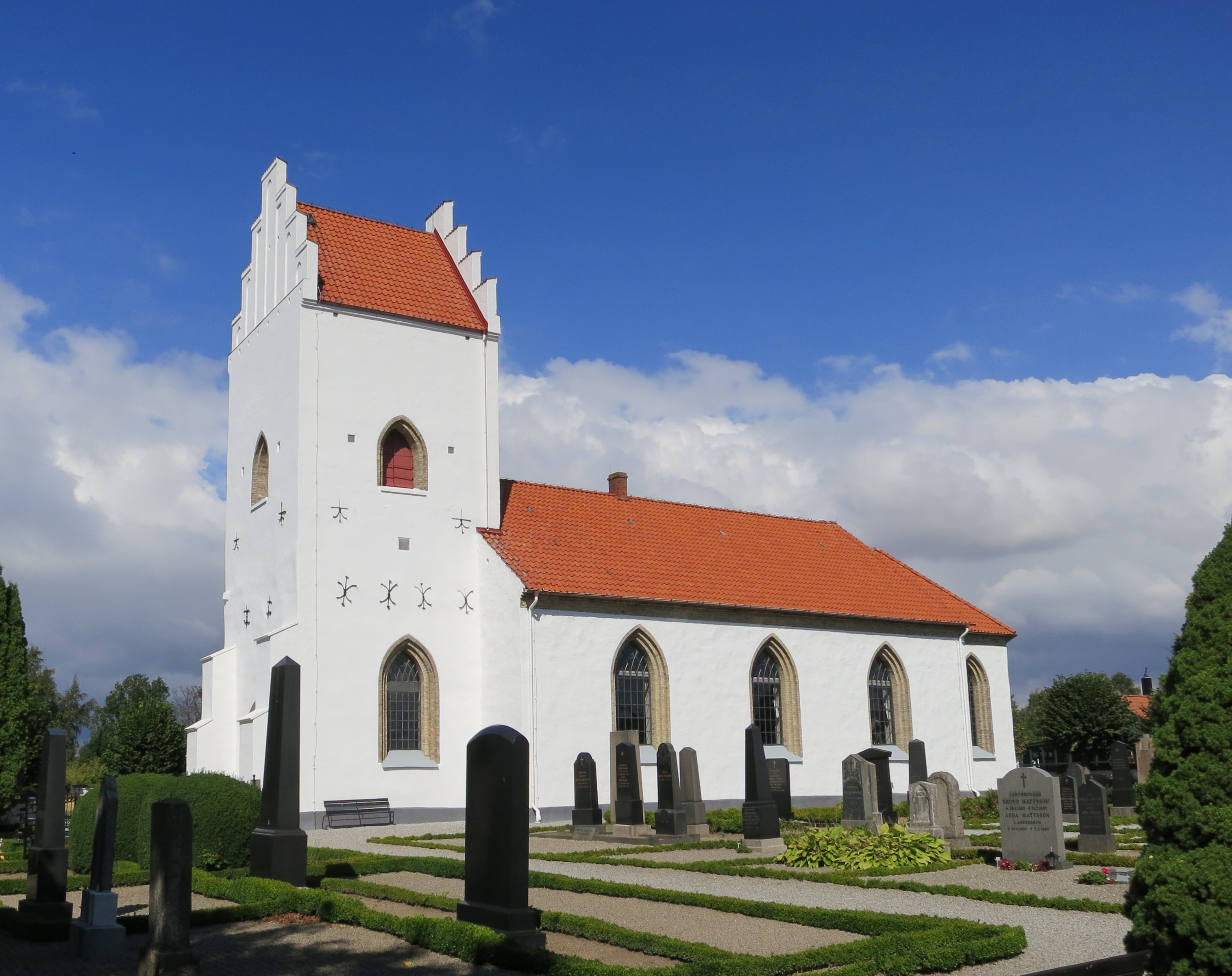 Eskilstorps kyrka i Vellinge, Skåne